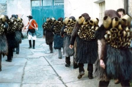 Un momento del Carnevale di Mamoiada